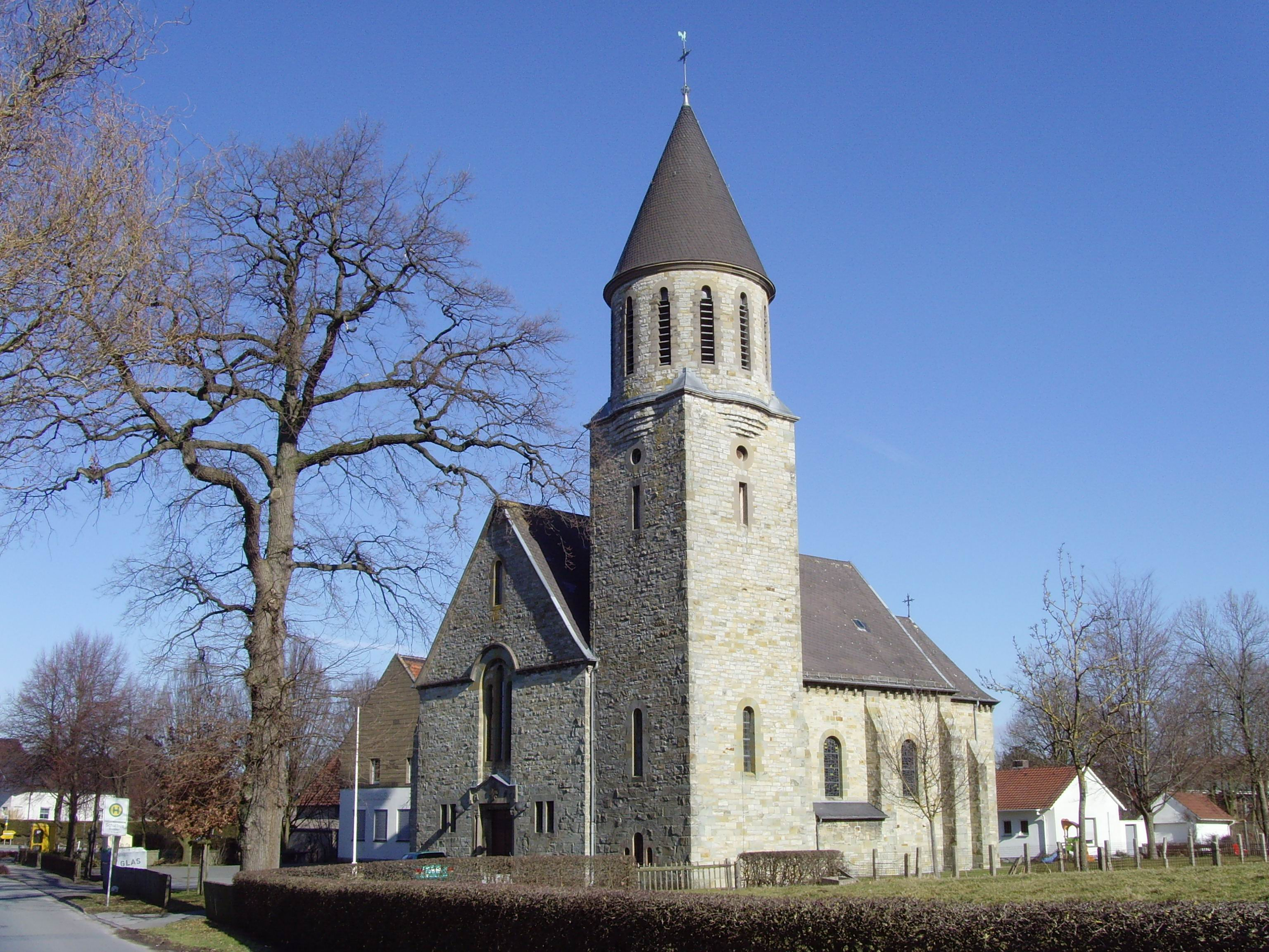 Kirche